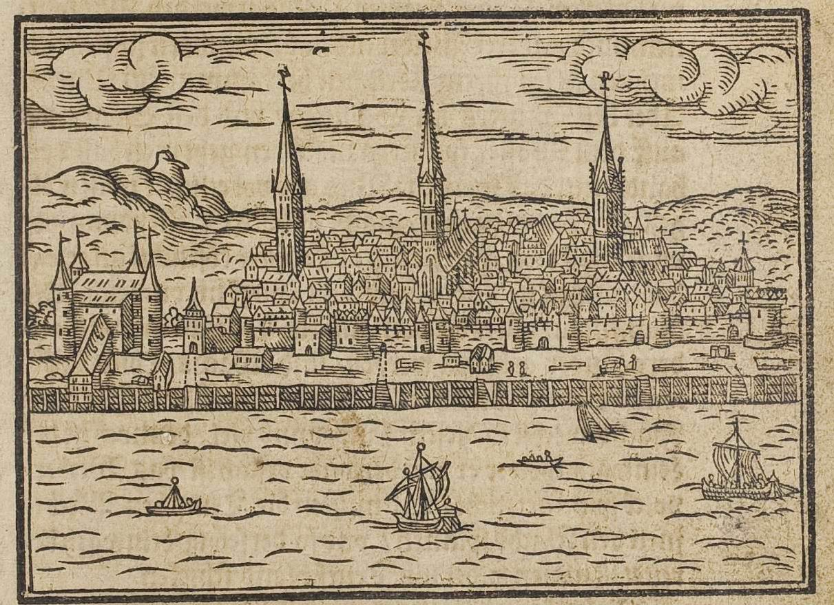 from: Abraham Saur: Theatrum Urbium. Warhafftige Contrafeytung/ und Summarische Beschreibung/ fast aller vornemen und namhafftigen Stätten/ Schlössern und Klöster ..., Frankfurt : Richter, 1610 (Erstausgabe: 1593)